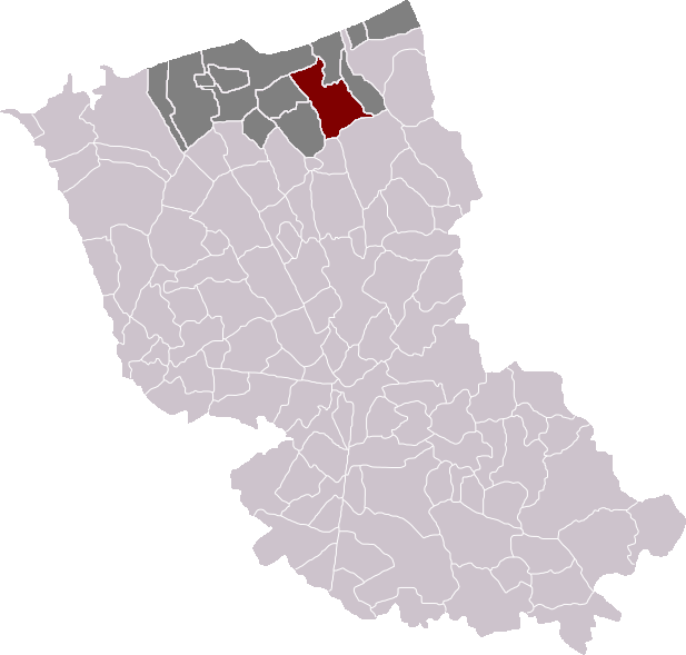 Locatie gemeente Tetegem in arrondissement Duinkerke. Zelfgemaakt. Location of Téteghem municipality in the arrondissement of Dunkirk. Self made. Localisation de la commune de Téteghem dans l'arrondissement de Dunkerque. Fait moi-même.